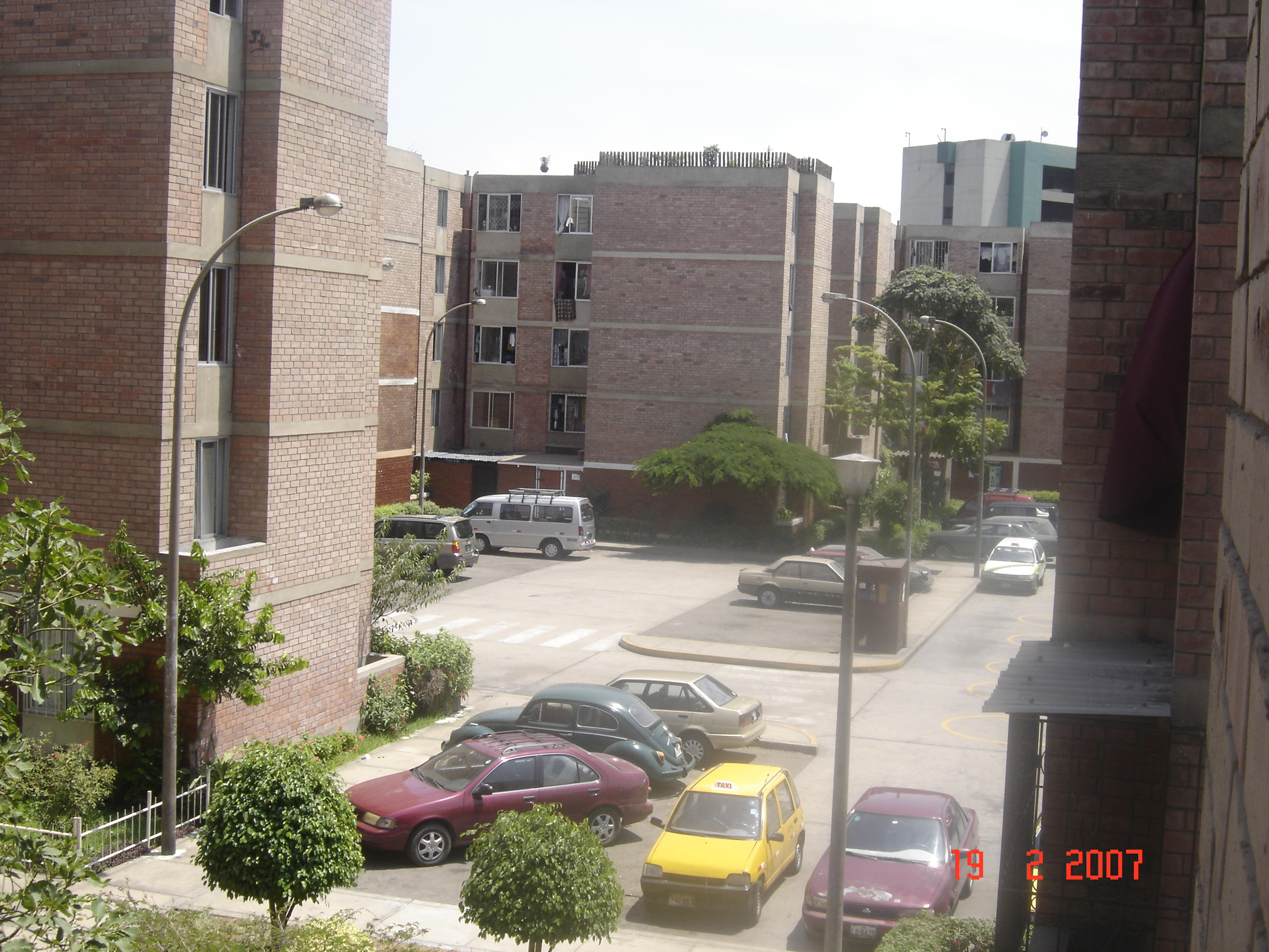 Vista desde la Plaza de la Integración de Dammert Muelle